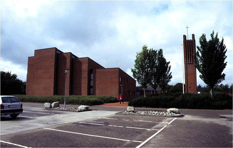 Holstebro Ellebæk Kirke i Danmark. Ellebæk kirke